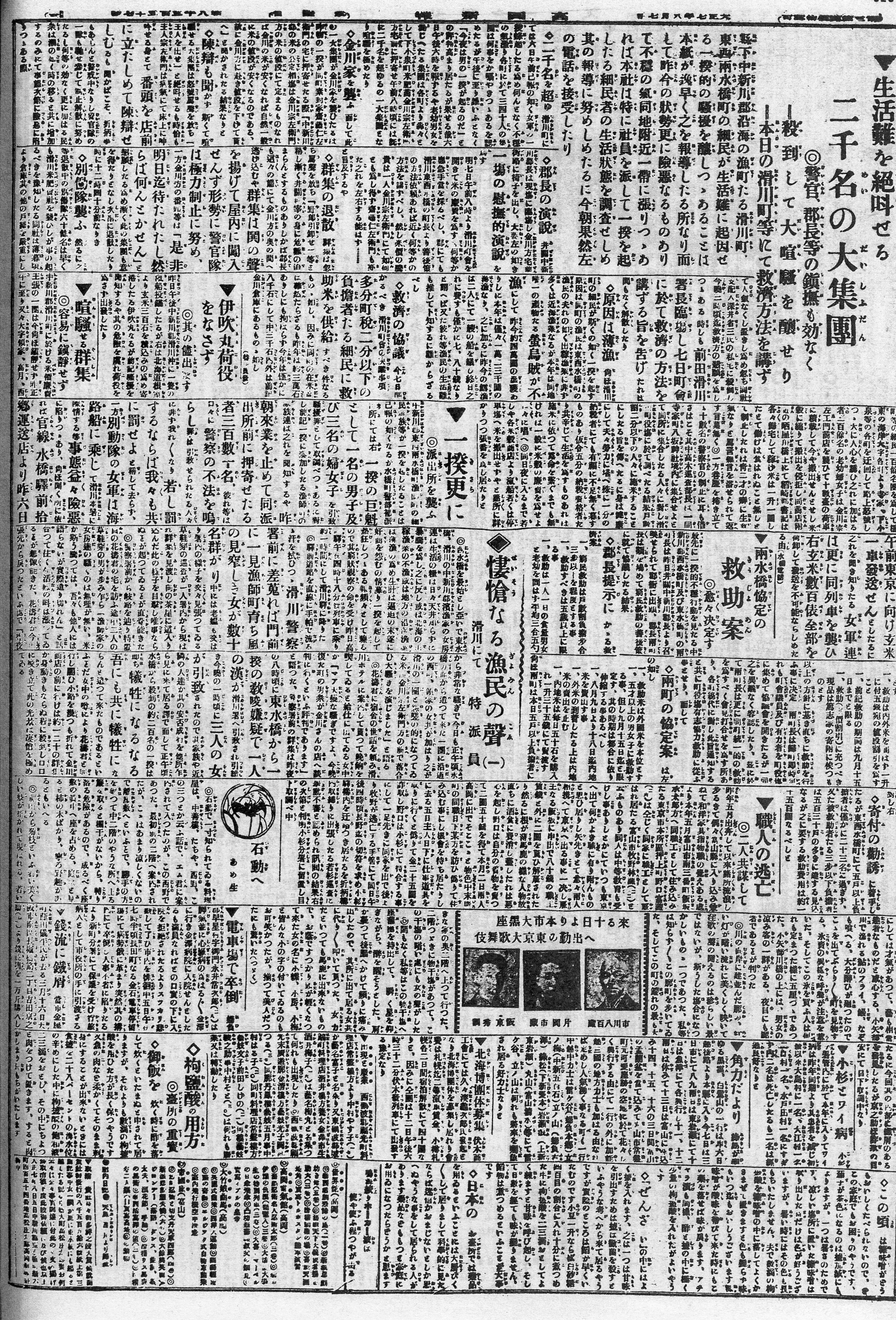 中新川郡における米騒動の激化を報ずる新聞